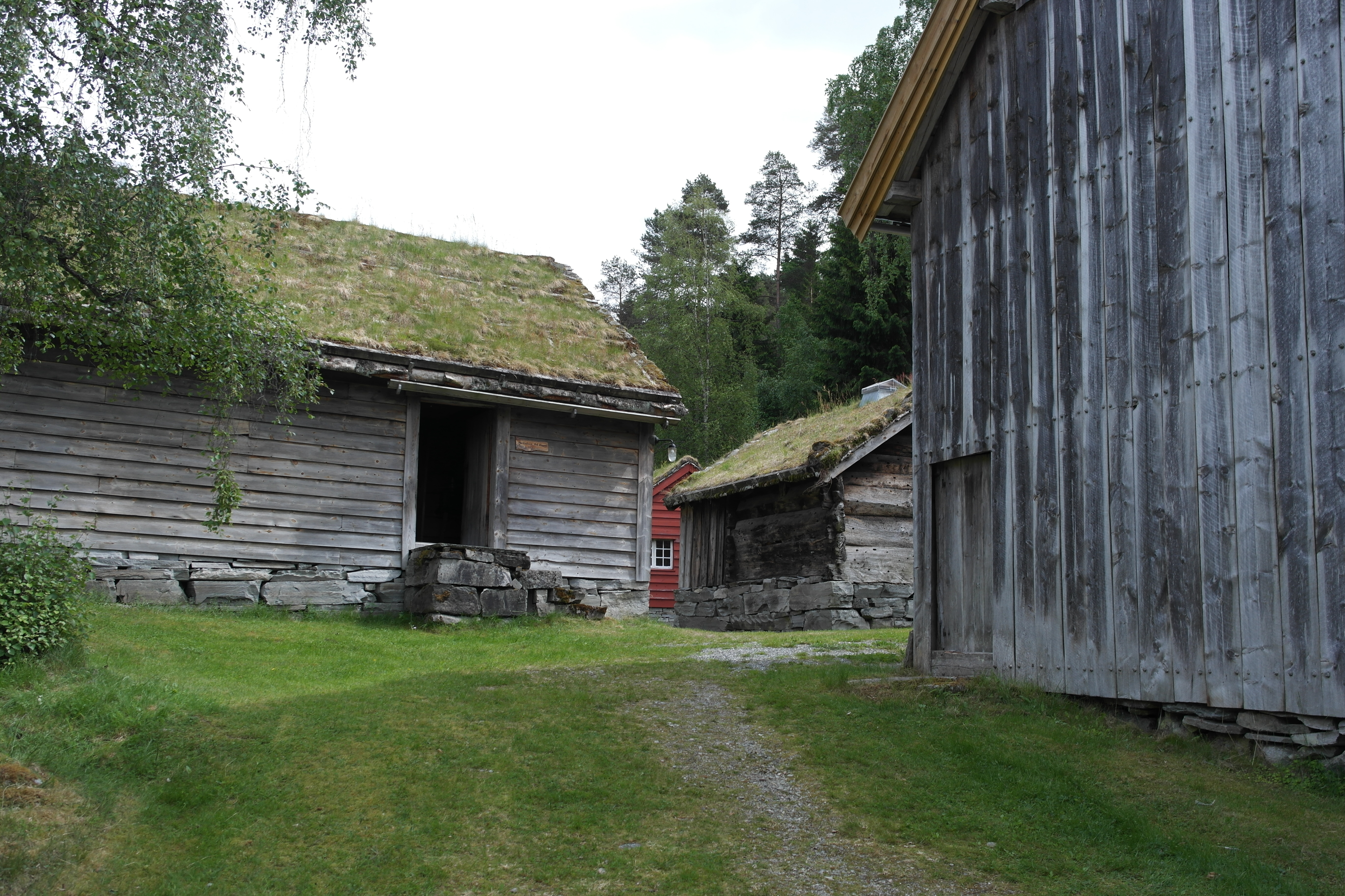 Stove frå Gloppen.